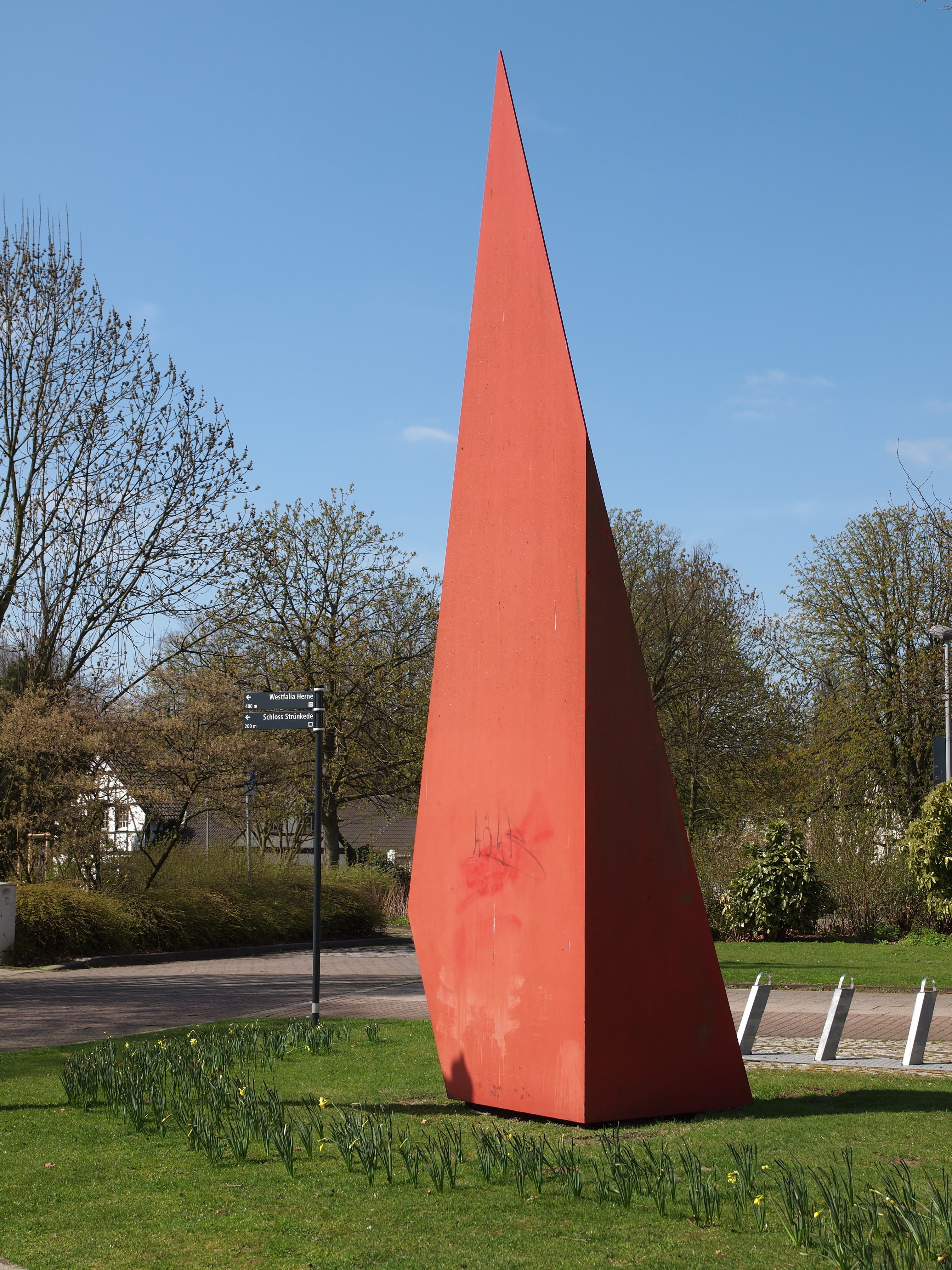 Cubecrack Nr. 1, eine Stahlskulptur von HD Schrader (1996) in Herne, Karl-Brandt-Weg, am Eingang zum U-Bahnhof Schloss Strünkede